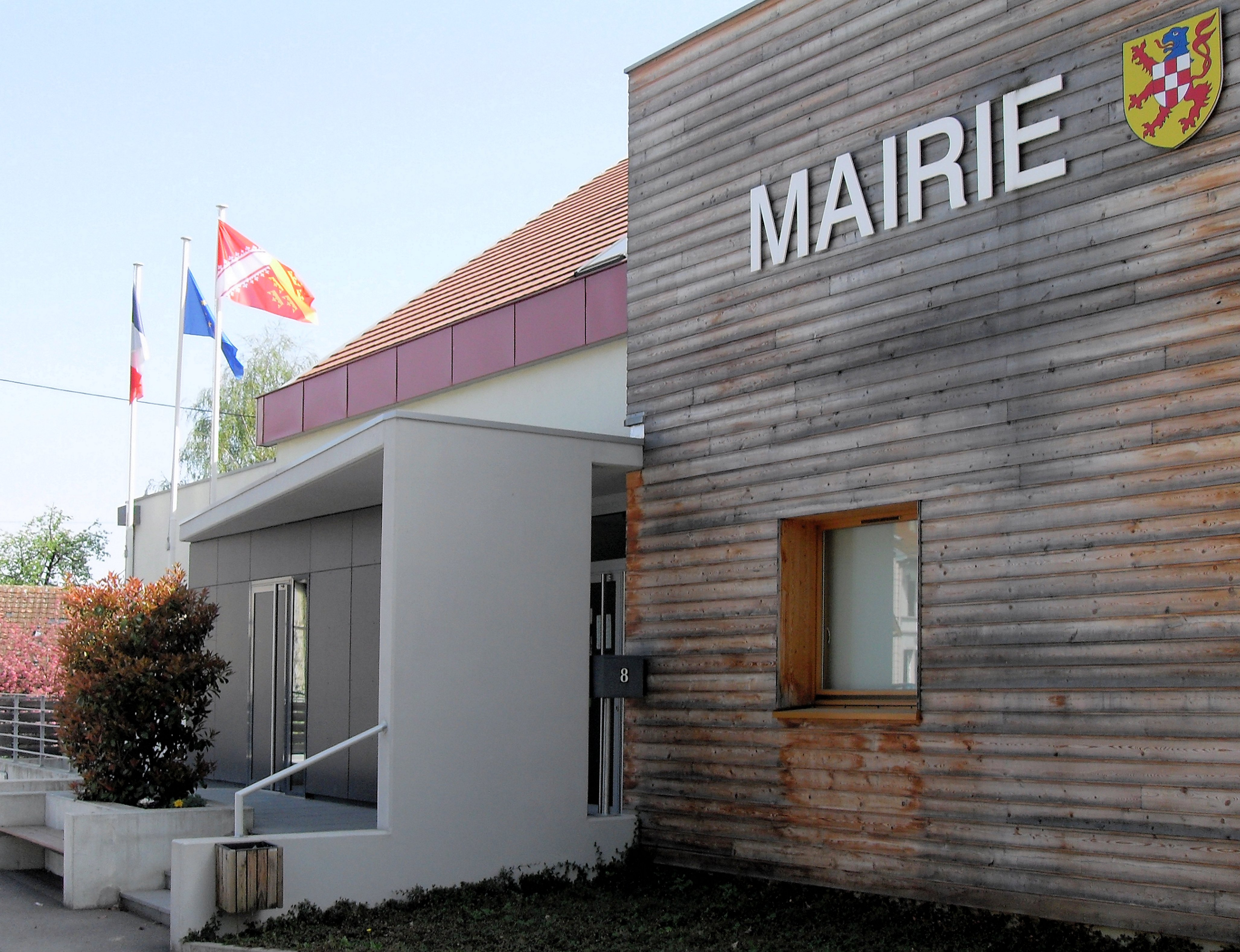 La mairie de Heidwiller